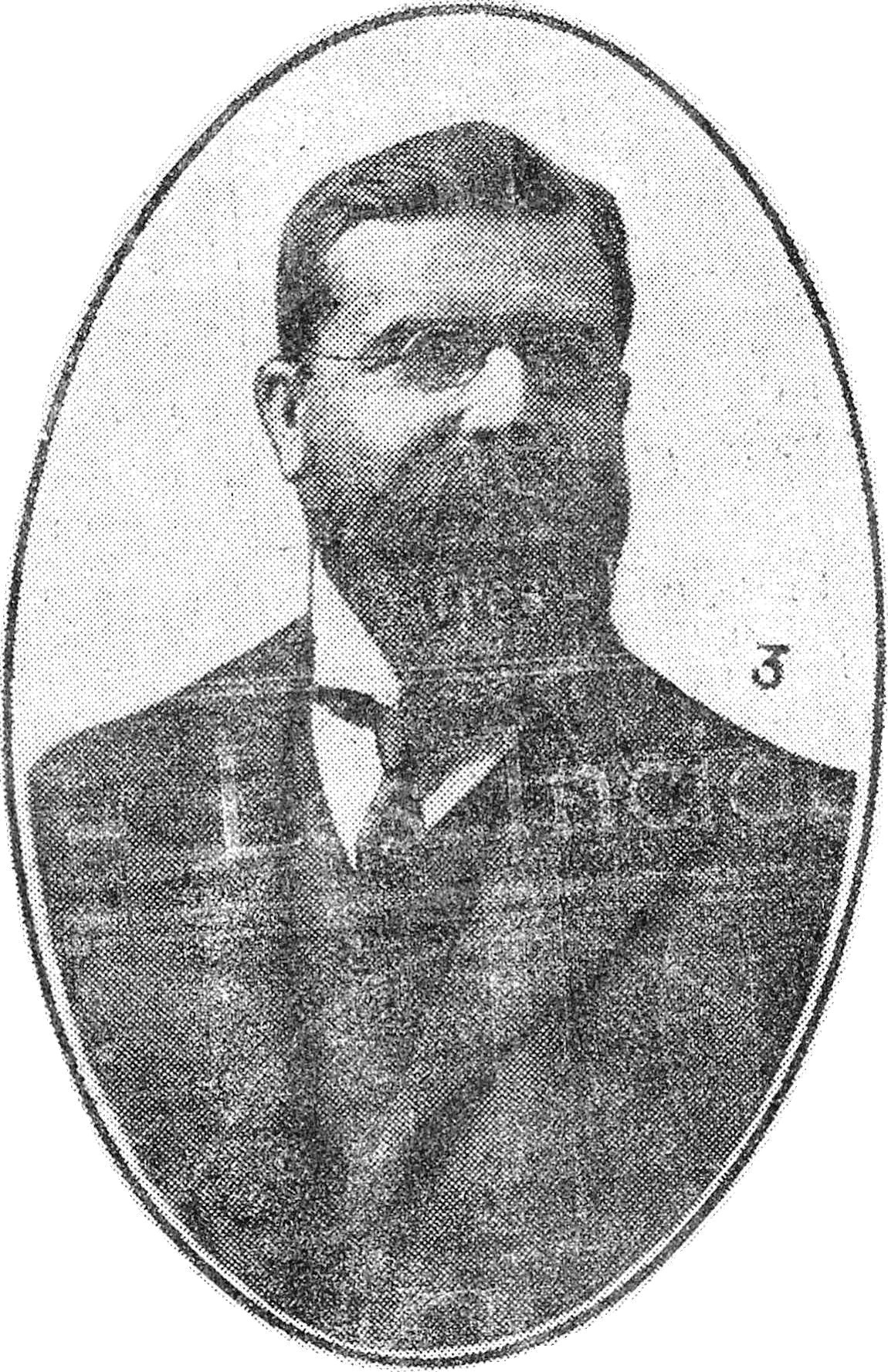 "Docteur Forêt, maire de Metz."